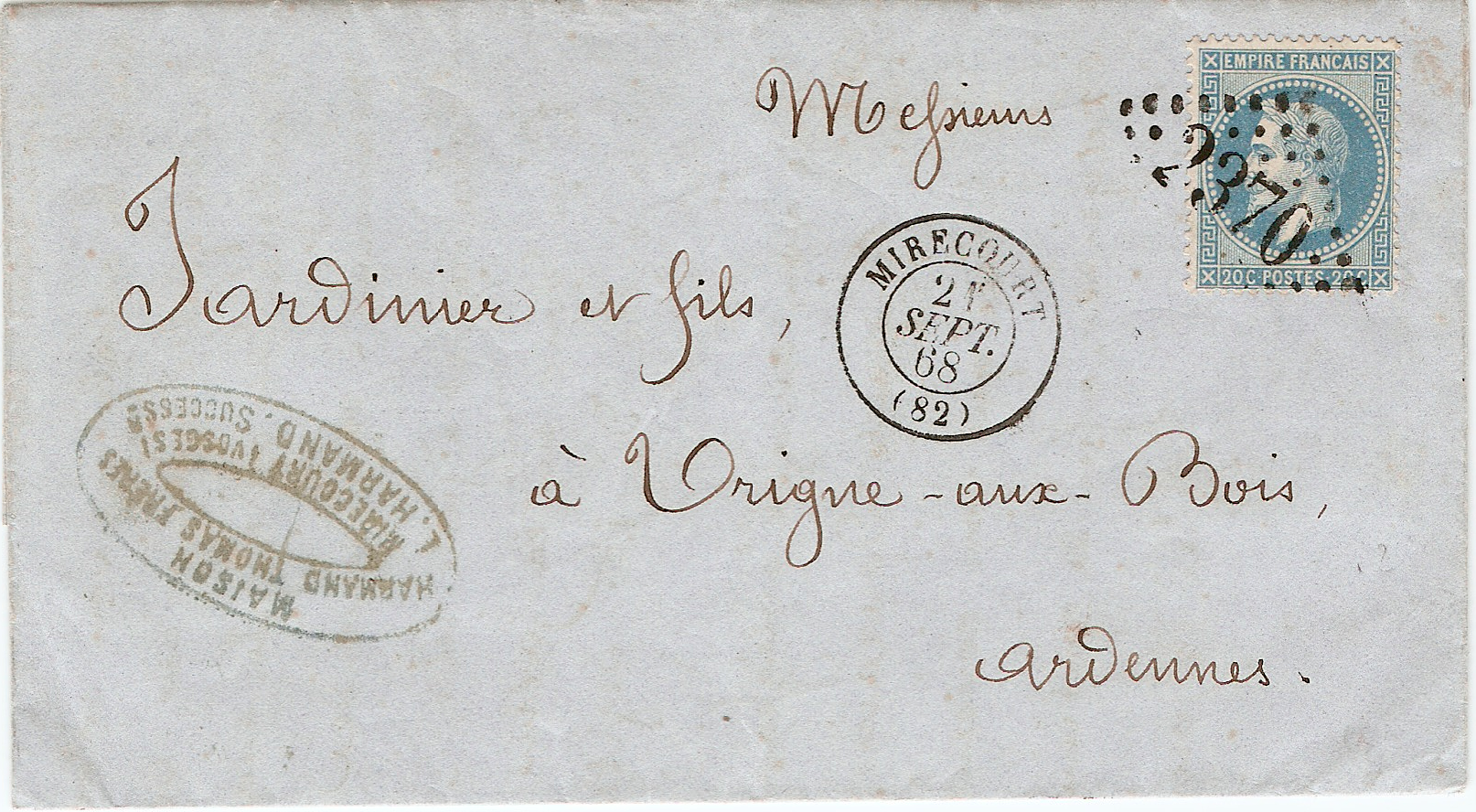 Lettre de France (Mirecourt) de 1868, affranchie avec un 20 centimes bleu Napoléon III de 1867, oblitérée avec un cachet gros chiffres 2370.